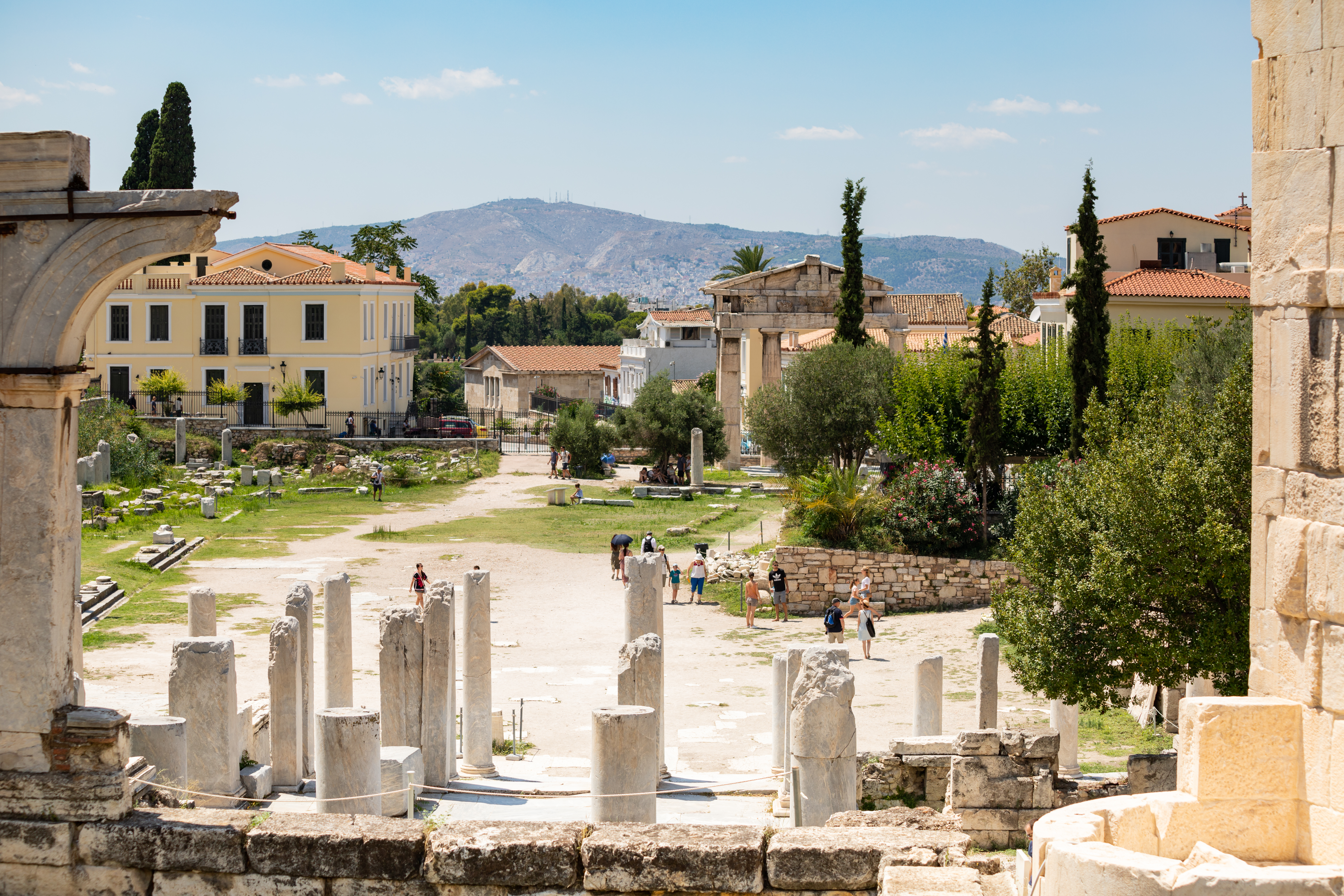 Römisches Forum in Athen